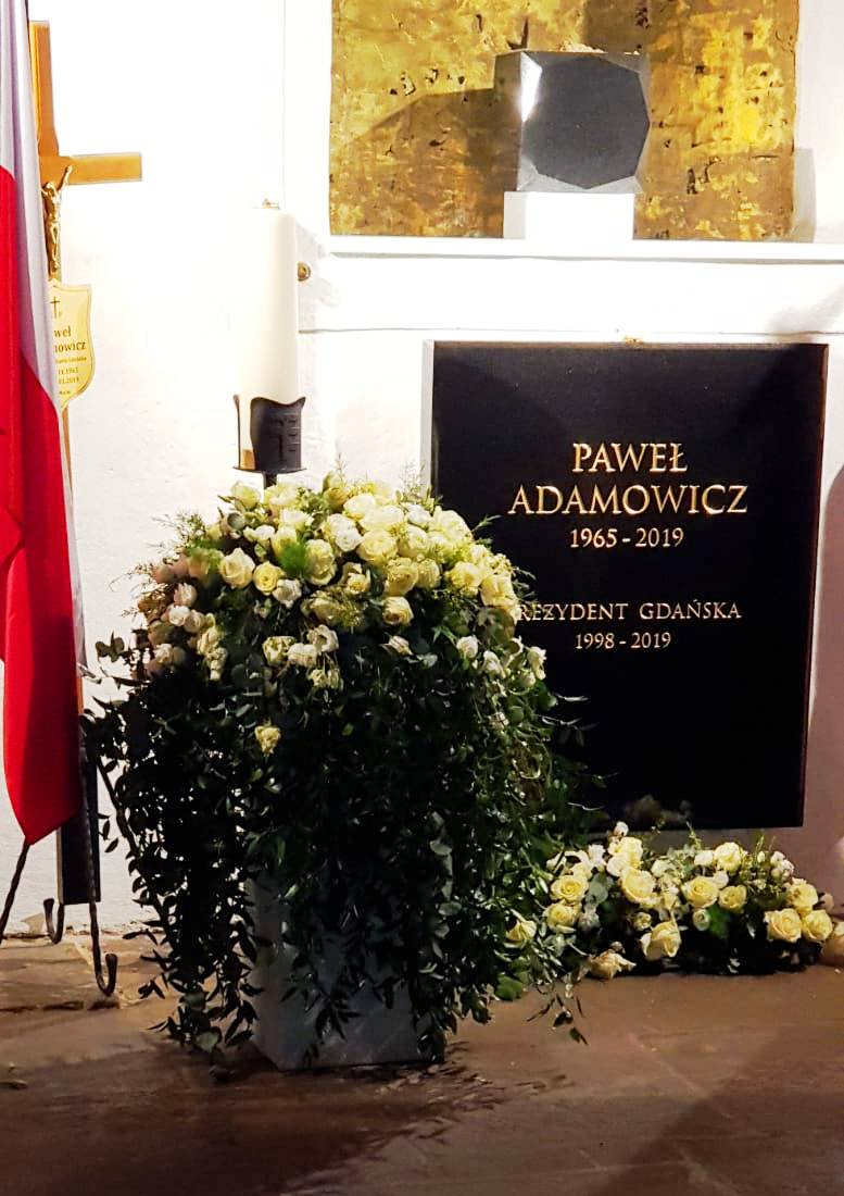 Urna z prochami Pawła Adamowicza.